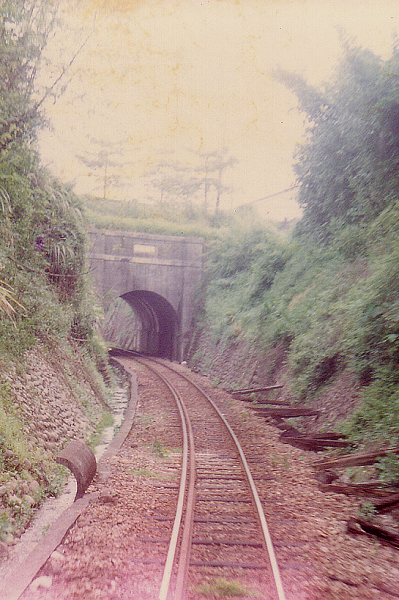 中文（台灣）: 東勢線上唯一的隧道。